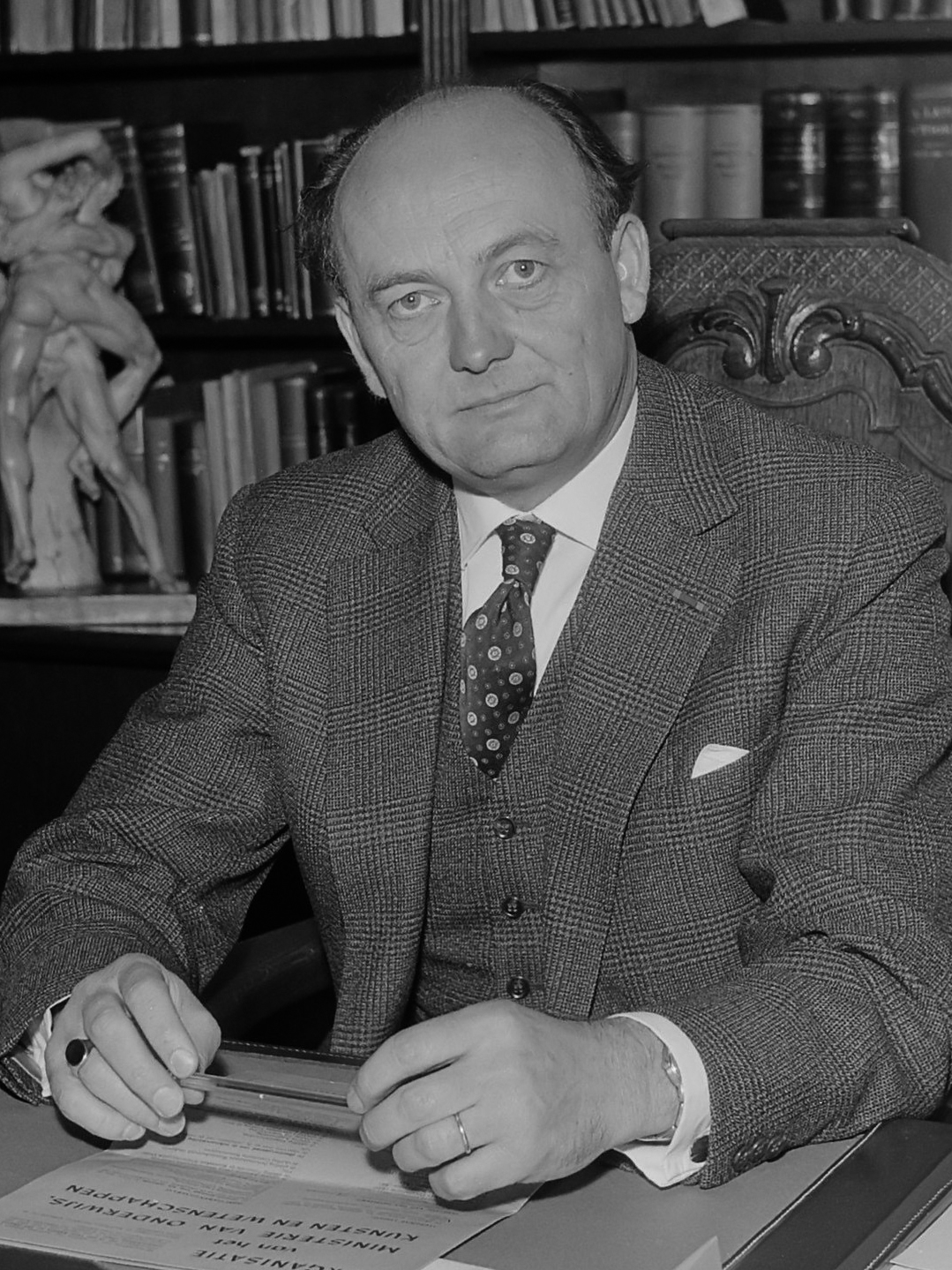 Professor H.A. Janssen benoemd tot staatssecretaris van Onderwijs, Kunsten en Wetenschappen 3 juni 1962